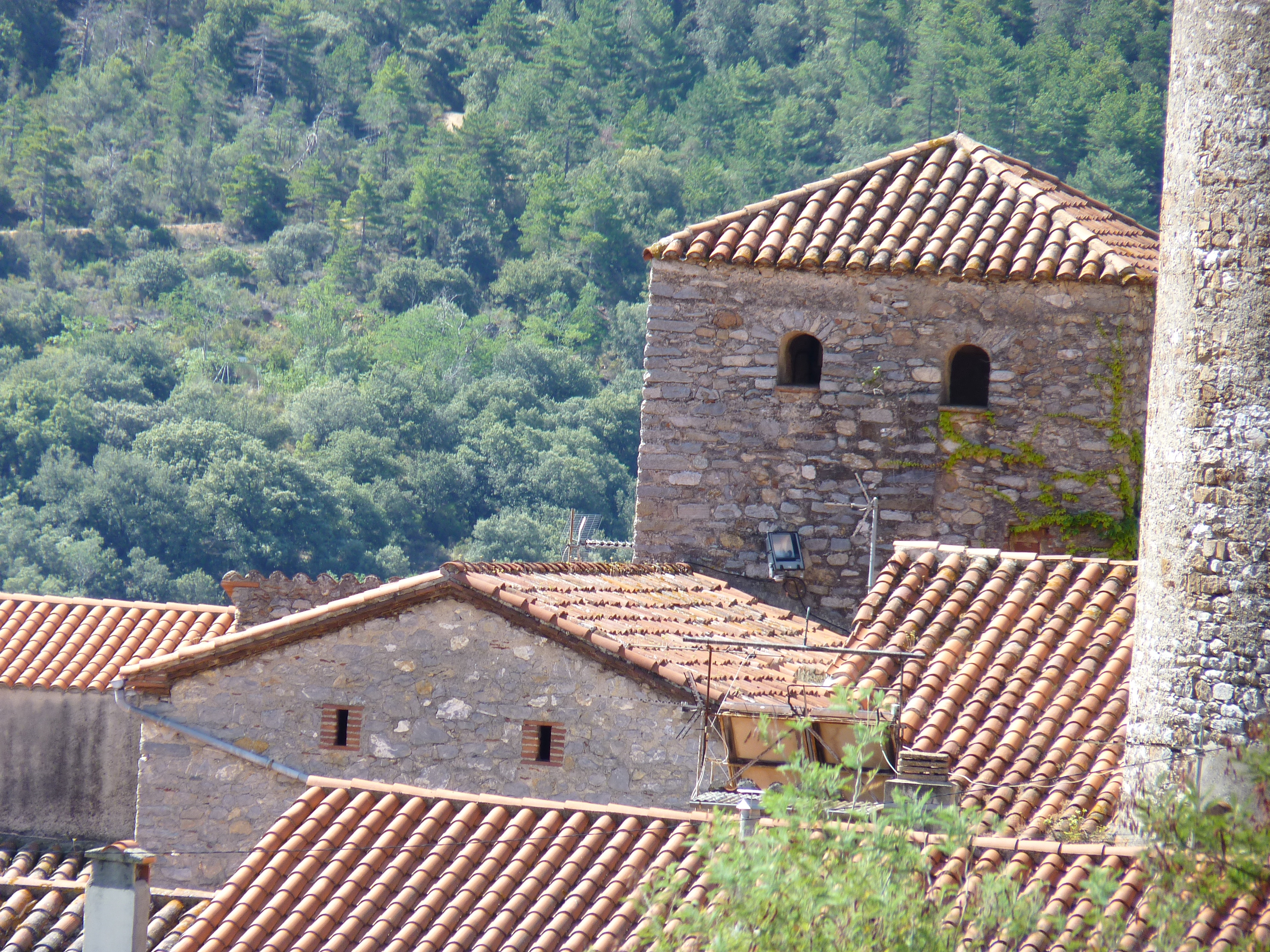 Église Saint-Martin de Palalda à côté de la tour, Amélie-les-Bains-Palalda (Pyrénées-Orientales, Languedoc-Roussillon, France)